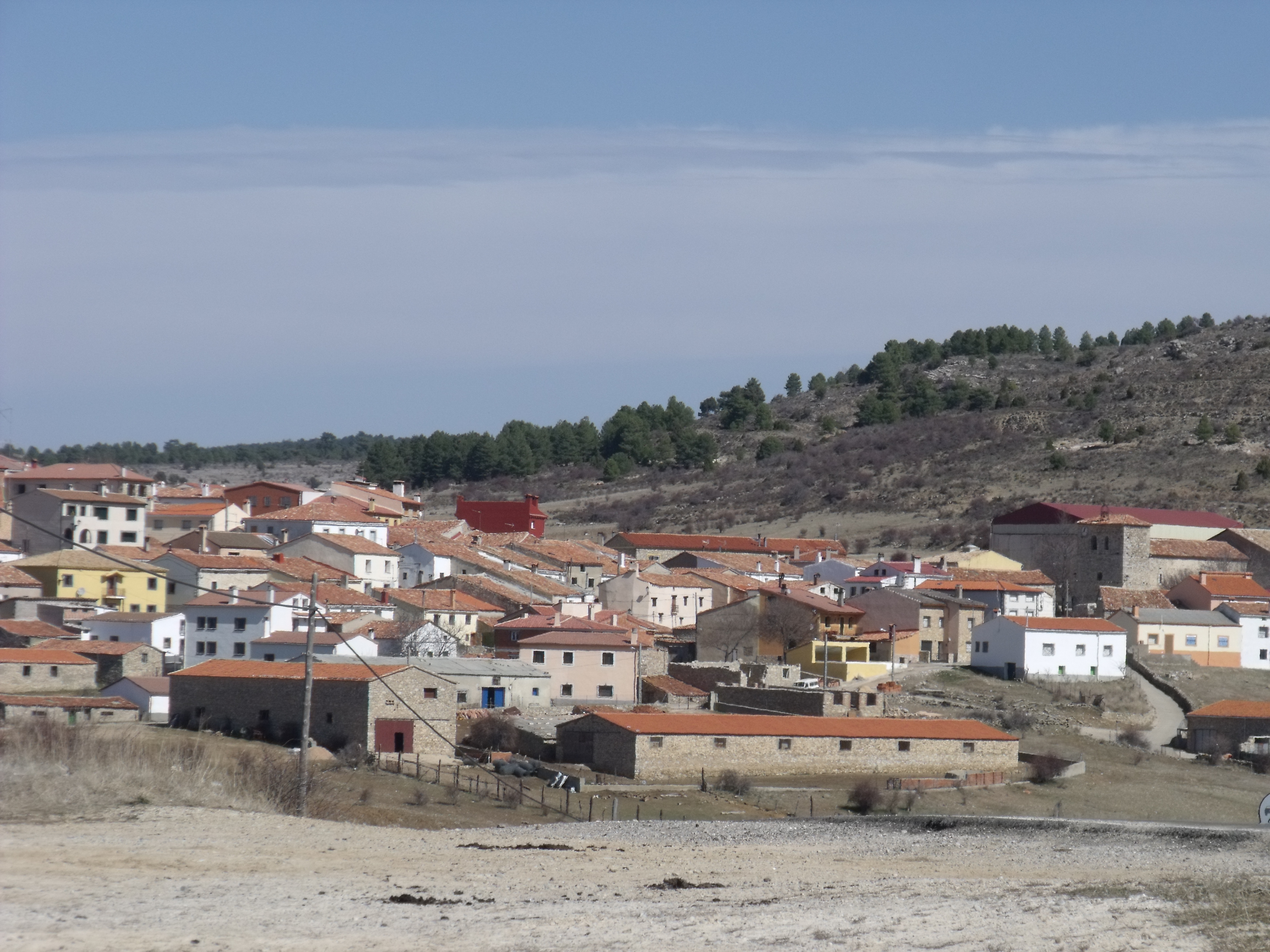 Vista de Lagunaseca desde el sur.